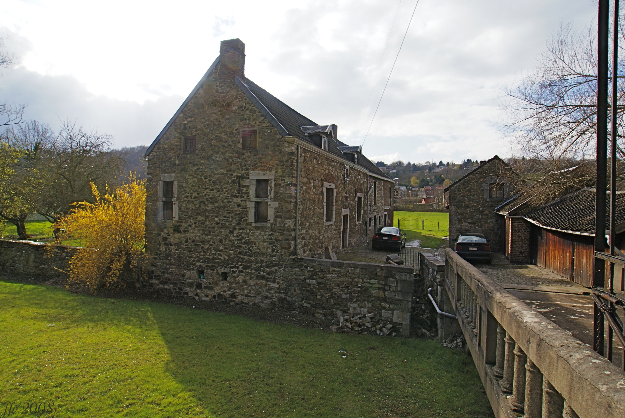 Chaudfontaine (Belgium) Former powder mill (1595) from the Curtius EstatMolino de pólvora datado en 1595 del industrial liegés Juan CurtiusMolí de pólvora de 1595 del industrial liegès CurtiusMoulin à poudre de 1595 de l'industriel liégeois Curtius Poermolen uit 1595 van de Luikse industrieel Curtius